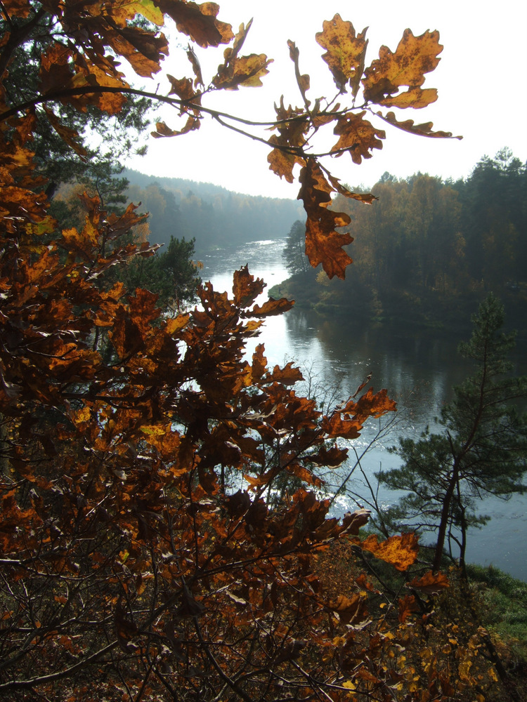 Karmazinų pažintinis takas